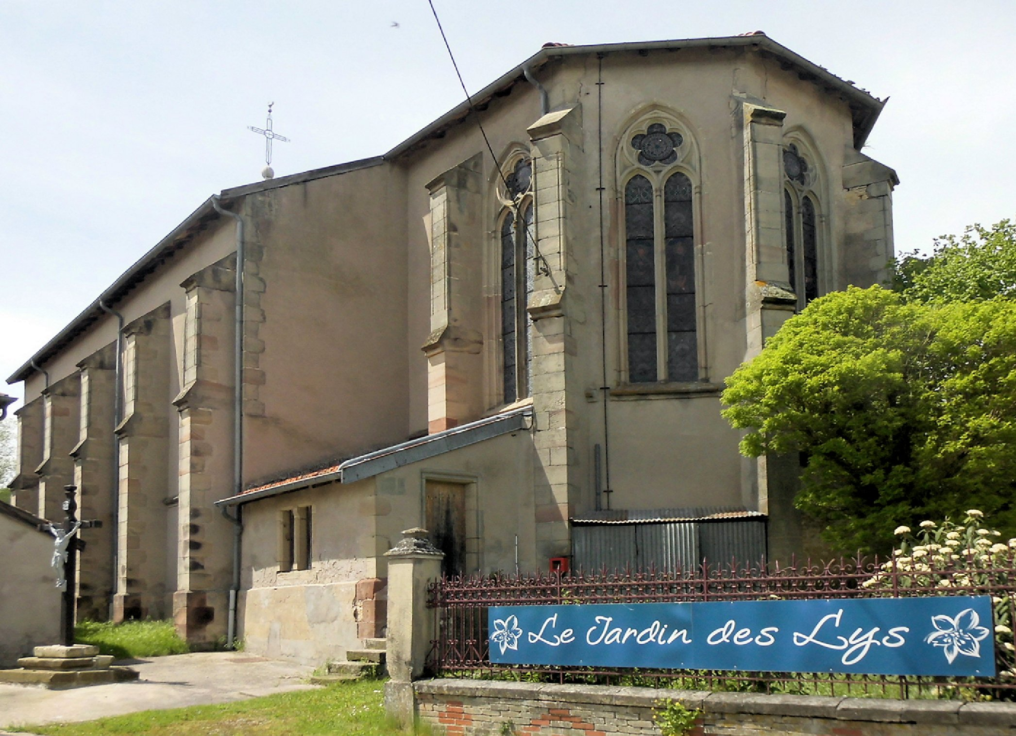 L'église Saint-Maur à Gemmelaincourt, côté est